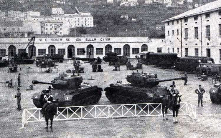 carri M26 in dotazione al Battaglione Corazzato "Avellino" in occasione del 4 novembre 1961; sul fabbricato in fondo si legge il motto della Brigata: "Non vi è sosta se non sulla cima"